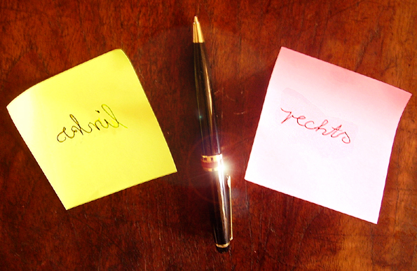 links/rechts (Dutch/German)